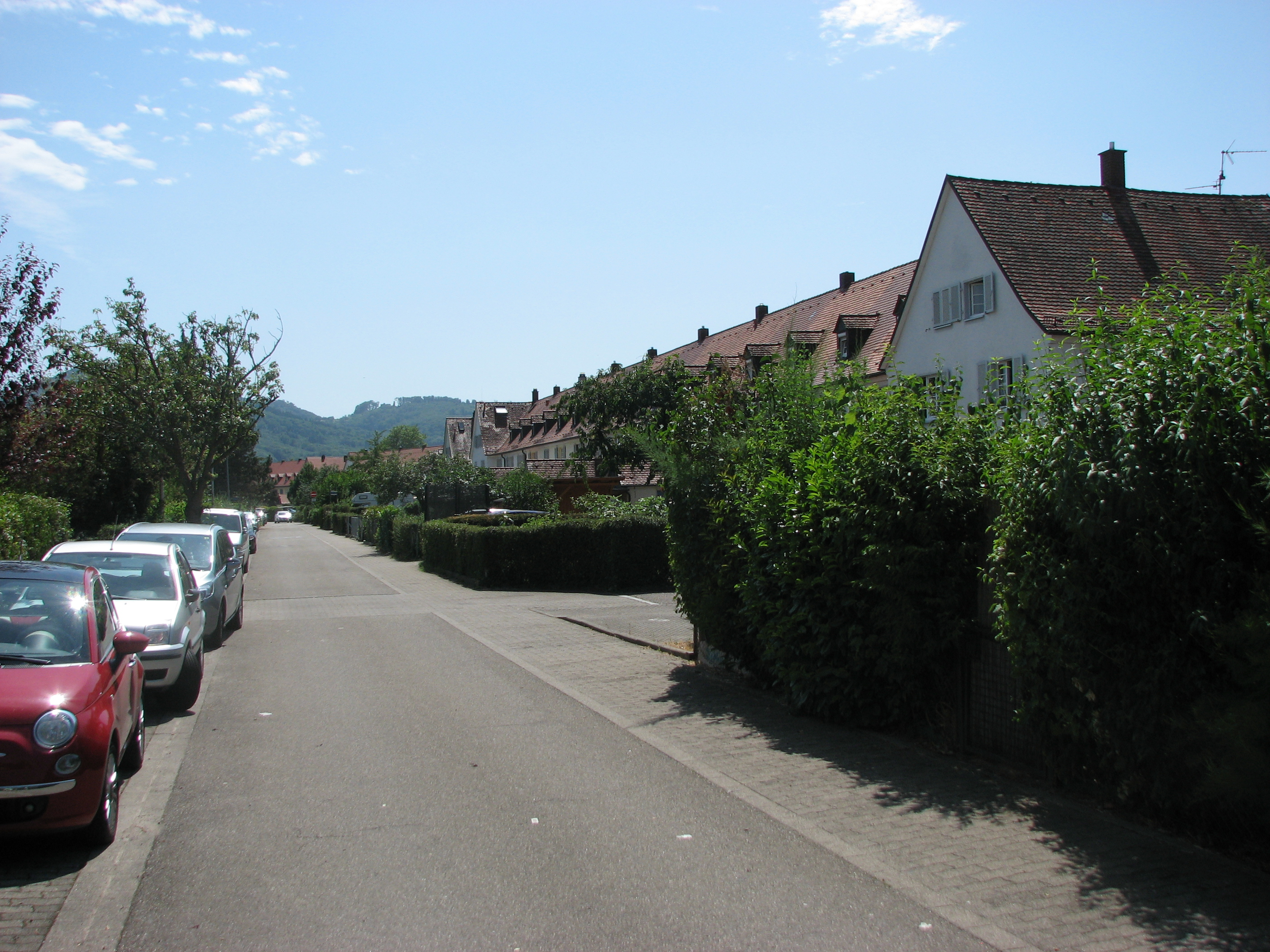 Gartenstadt Freiburg, Ansich auf Häuserzeile (Block), mittleres Baulos